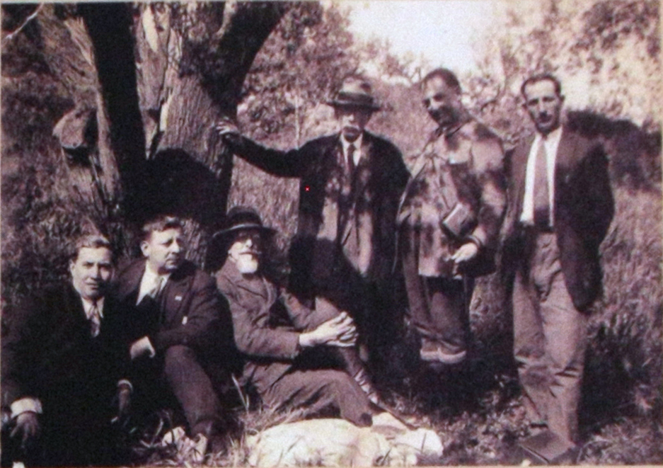 Foto del 1930